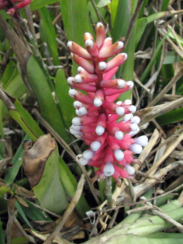 Aechmea gamosepala